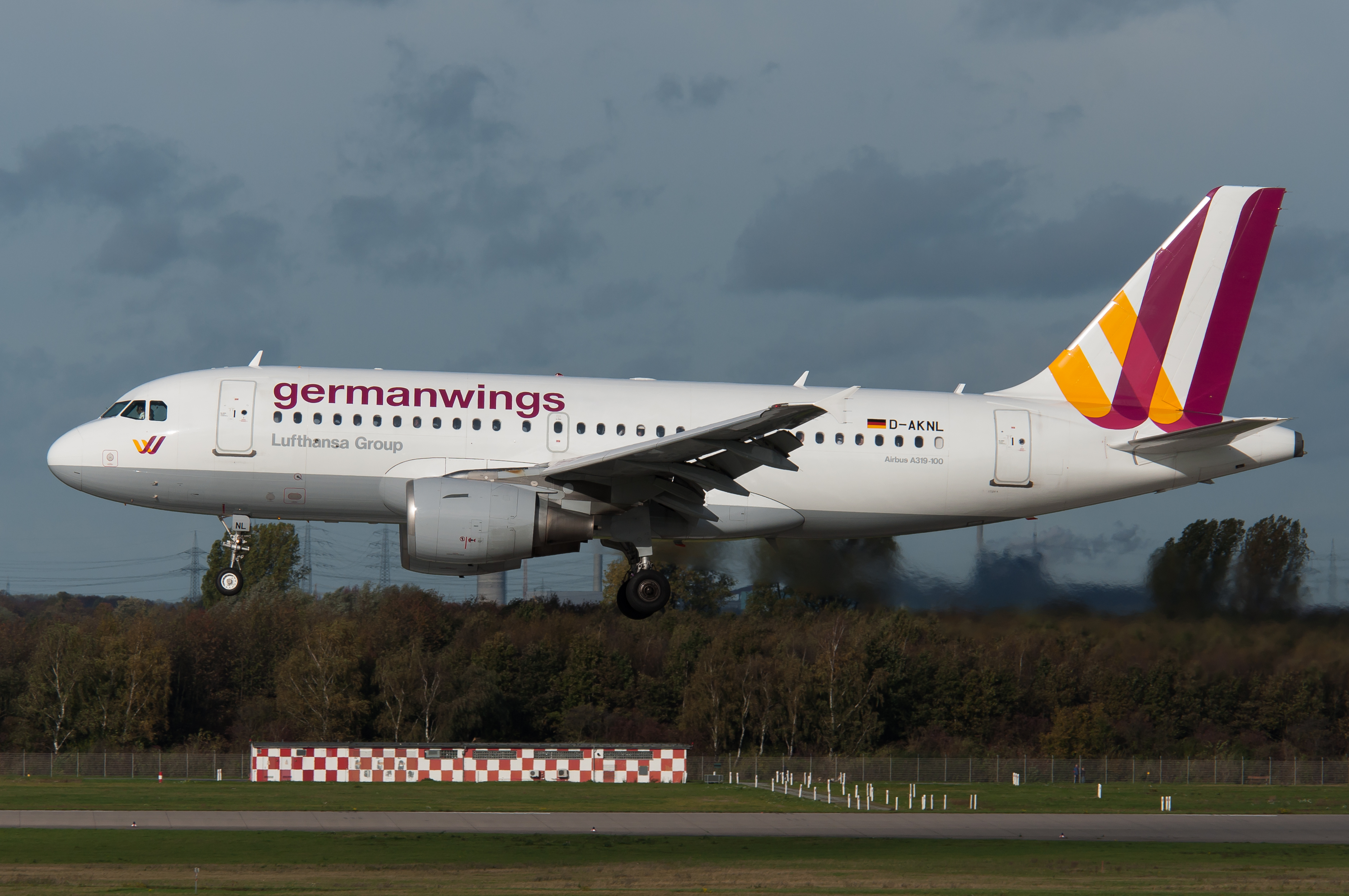 Dusseldorf, 3-11-2013